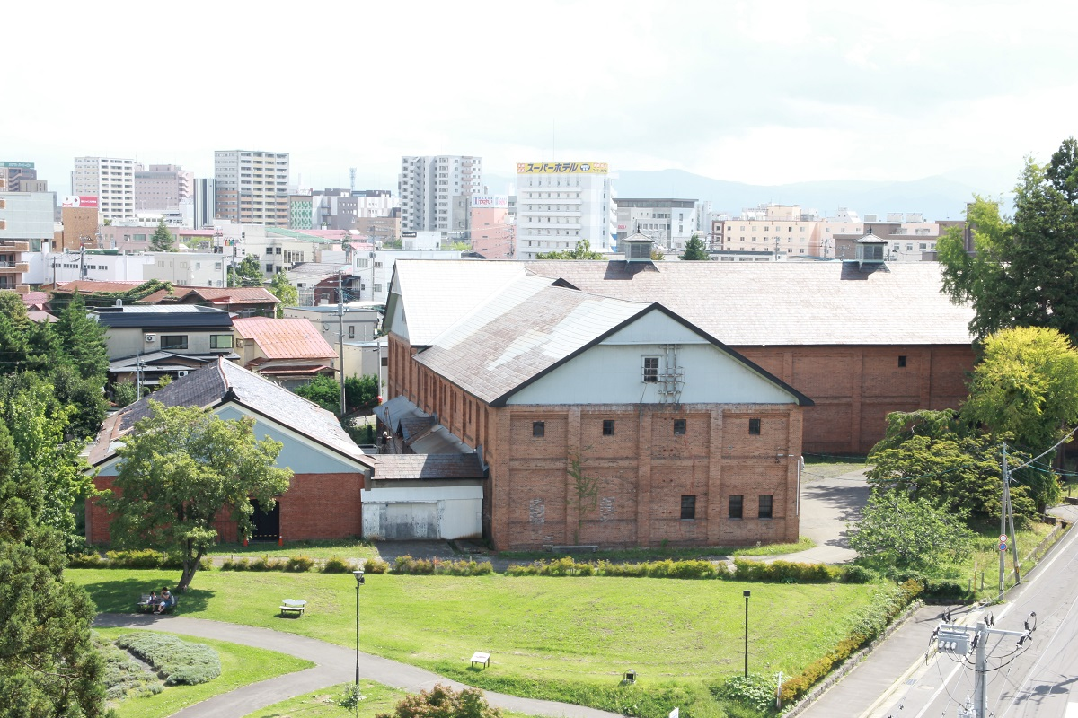 吉野町煉瓦倉庫（旧吉井酒造煉瓦倉庫）の外観写真